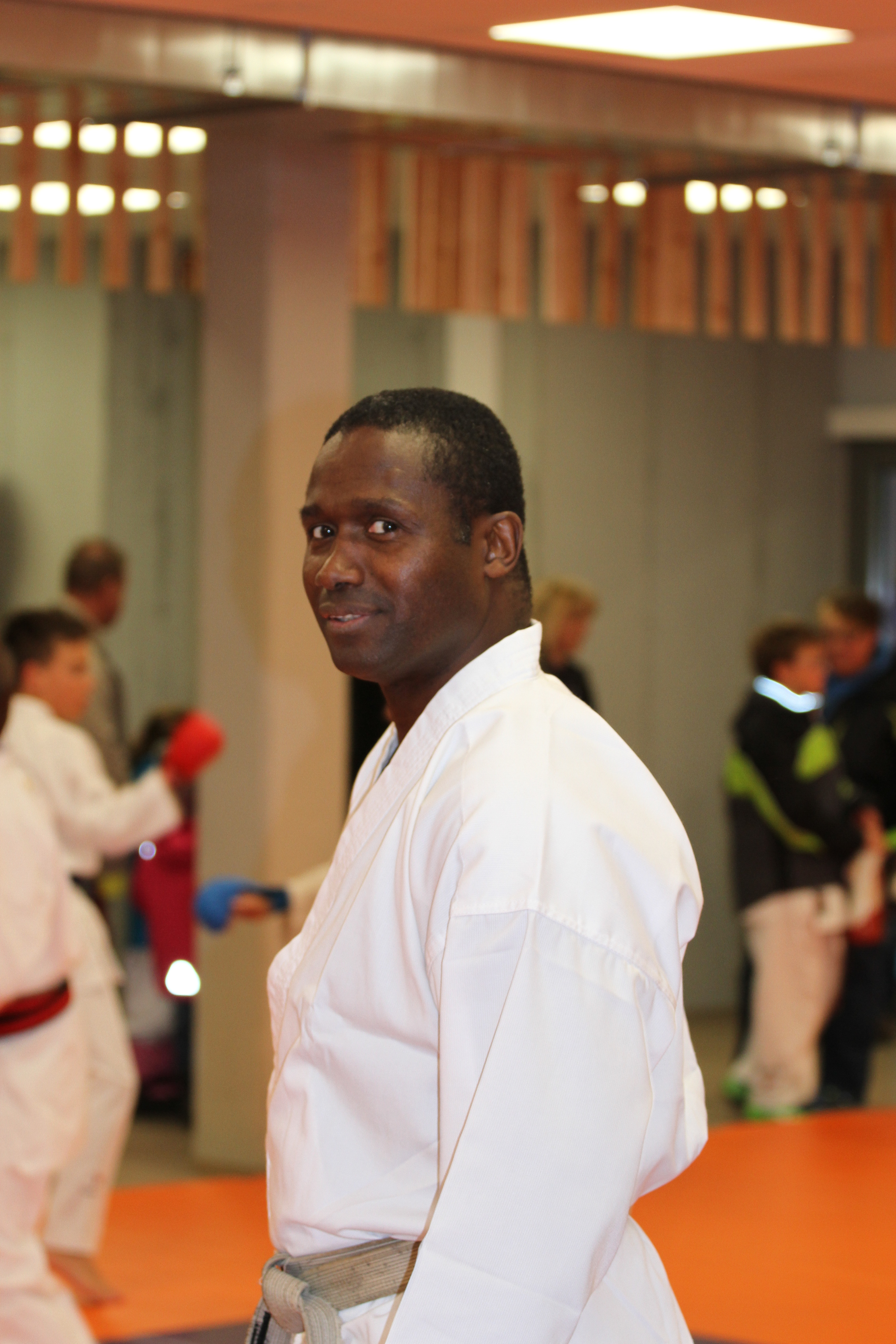 Dr. Wayne Otto 5-facher Karate-Weltmeister